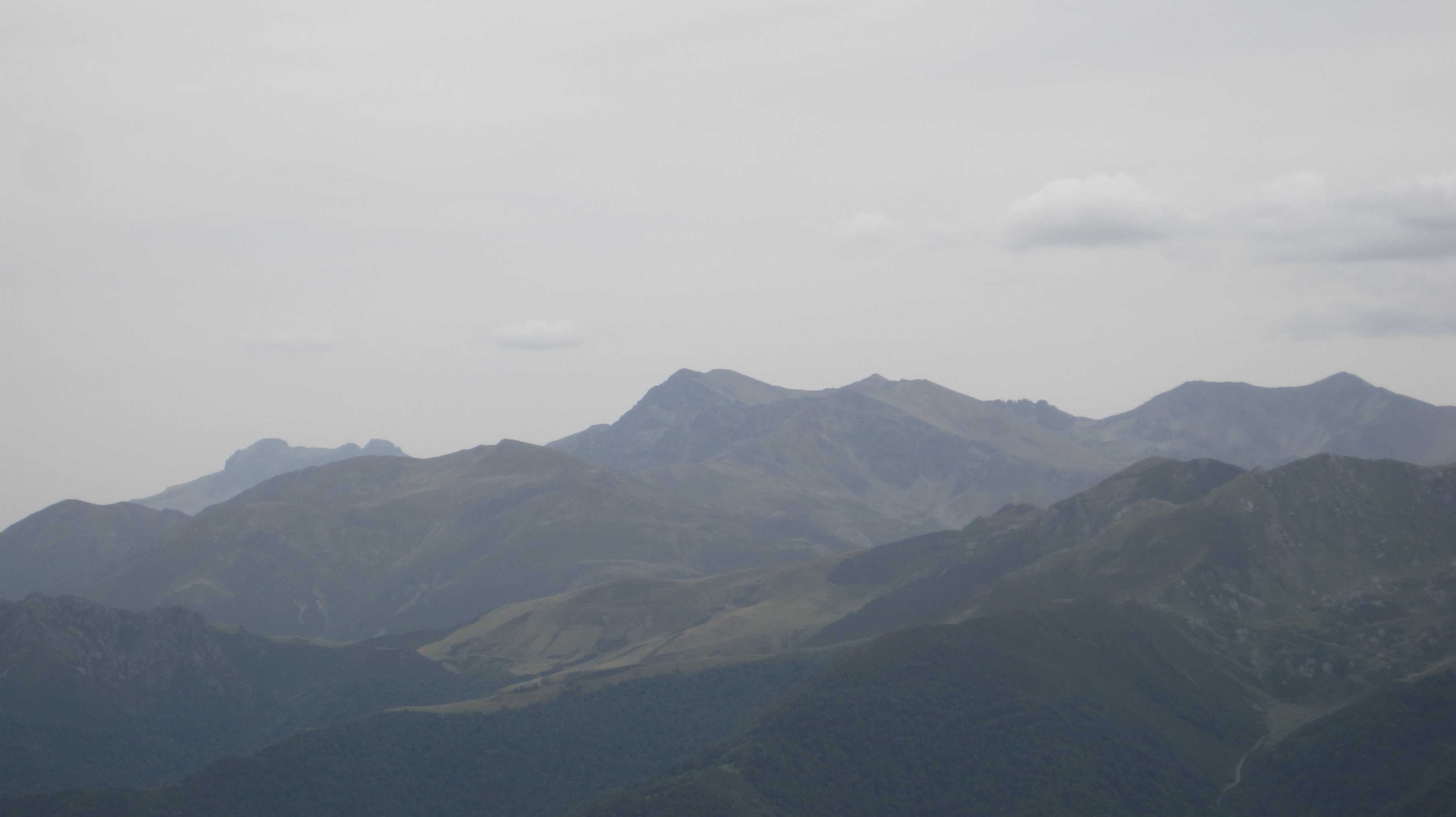 Vista de Peña Prieta desde el mirador de Fuente Dé, Cantabria, España.